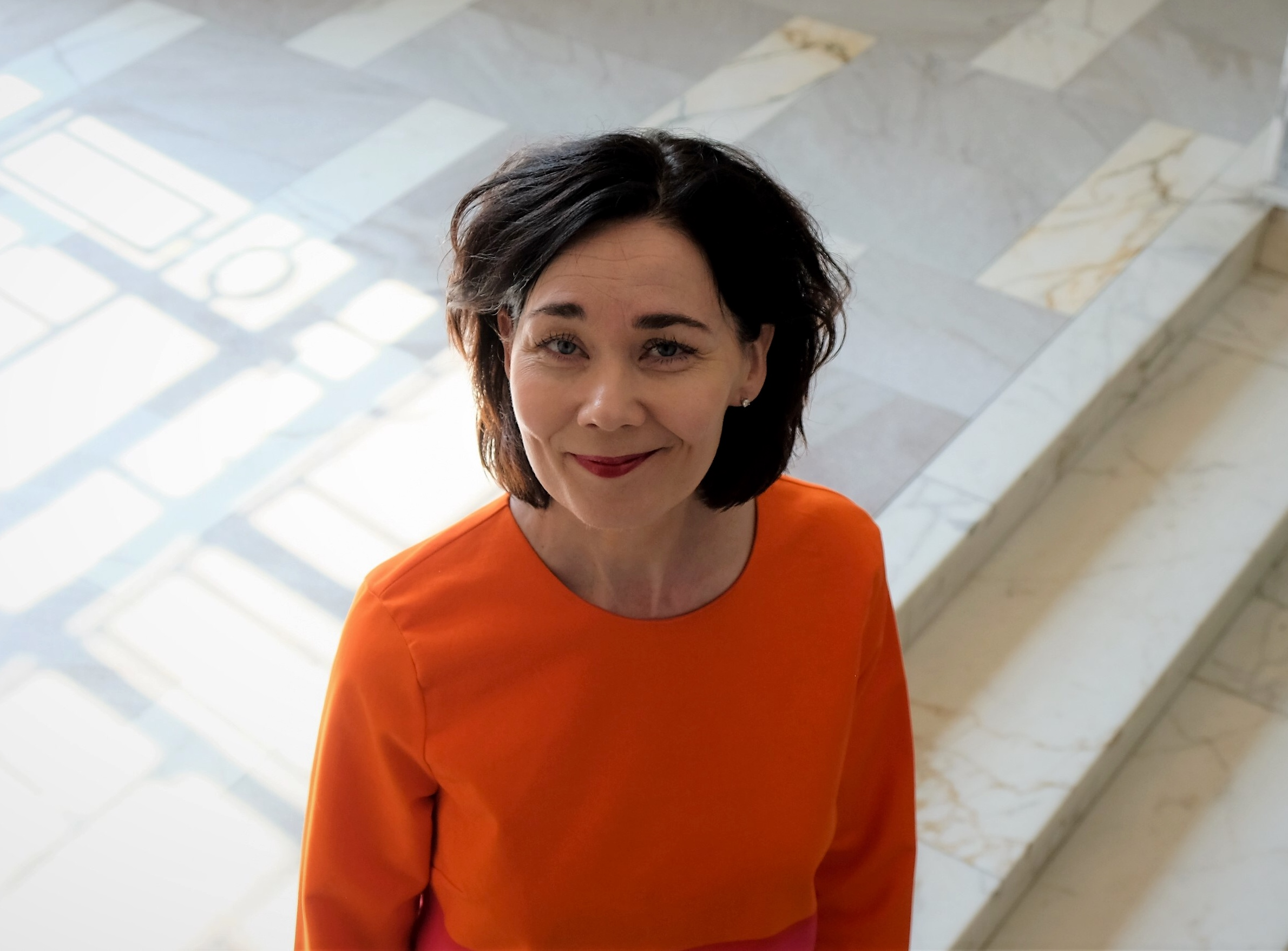 Hanna-Leena Mattila Helsingissä kesäkuussa 2019 Hanna-Leena Mattila i Helsingfors juni 2019